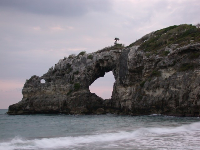 Playa Ventana